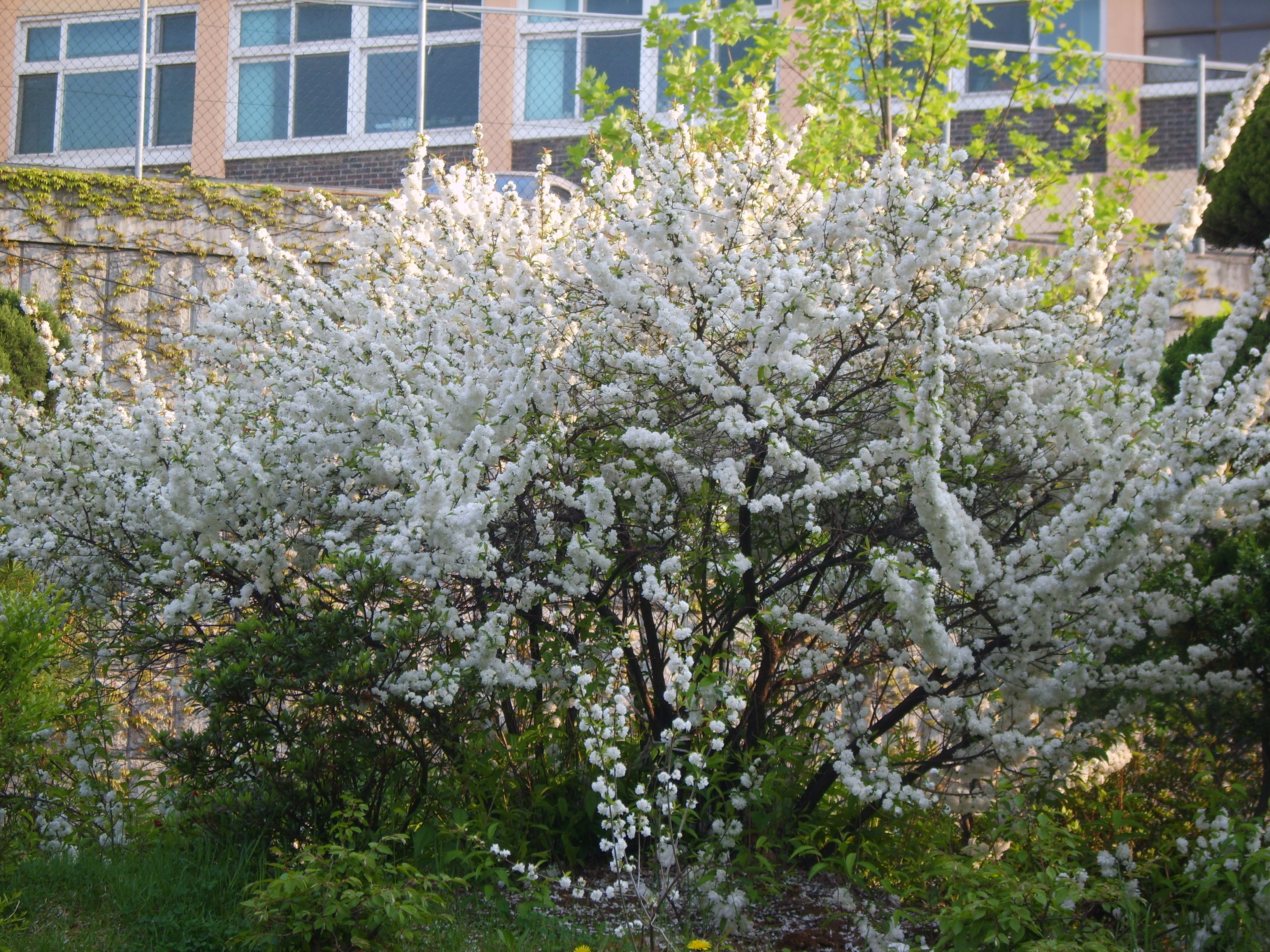 Prunus glandulosa 'Albiplena' in Incheon Korea. 인천성동학교에 사는 옥매.